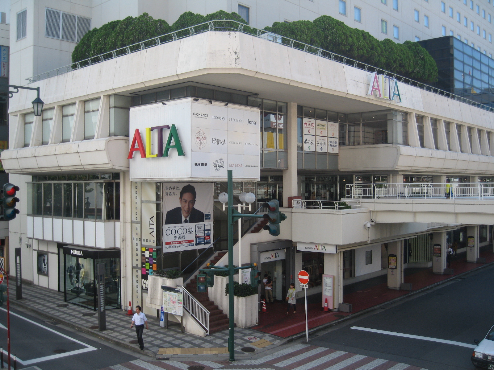 新潟アルタの画像。